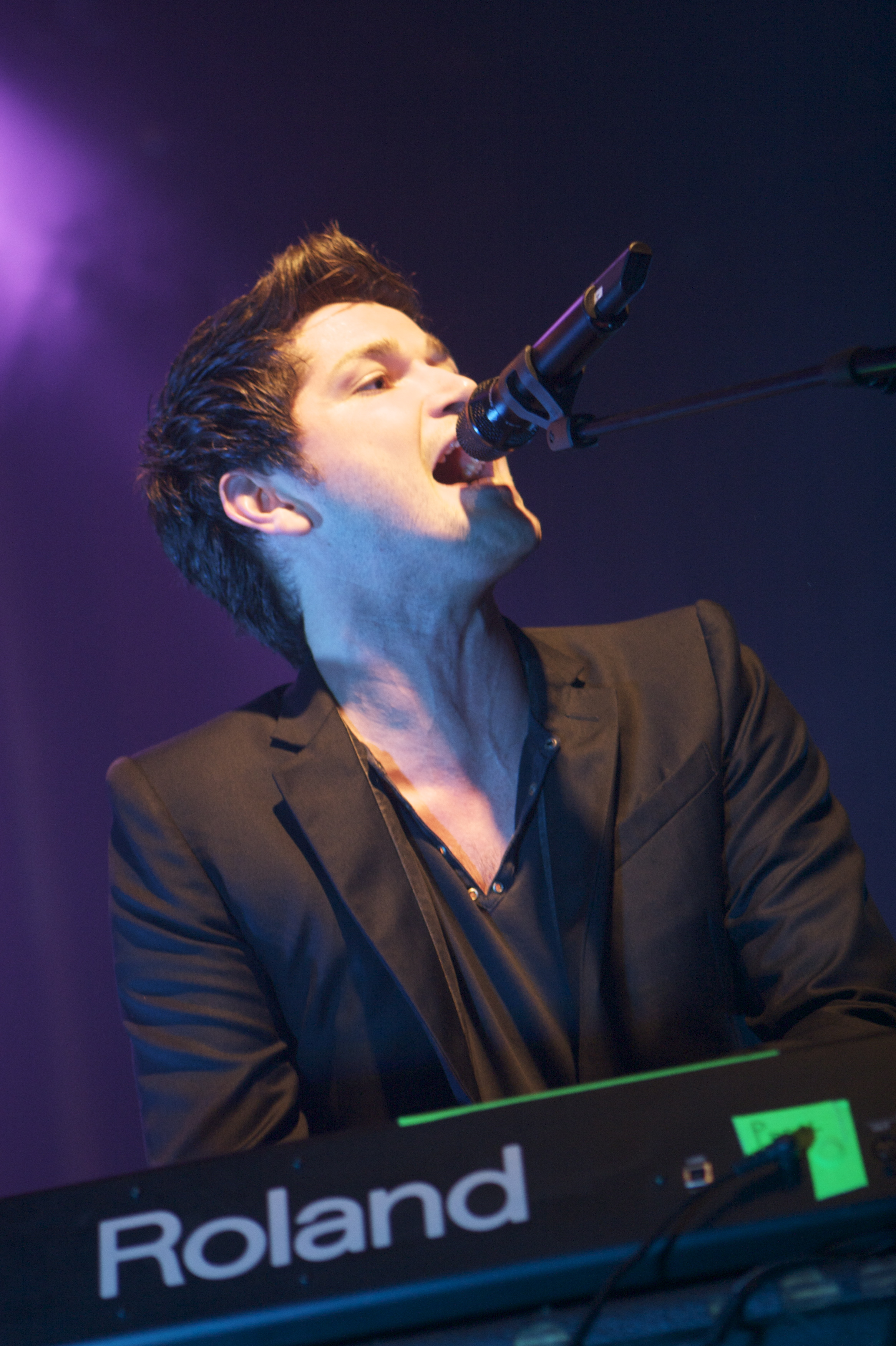 The Script en la Sala Apolo de Barcelona el 2 de Marzo de 2009